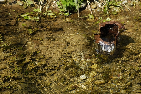 Capralba (CR) - Fontanile Maccherone